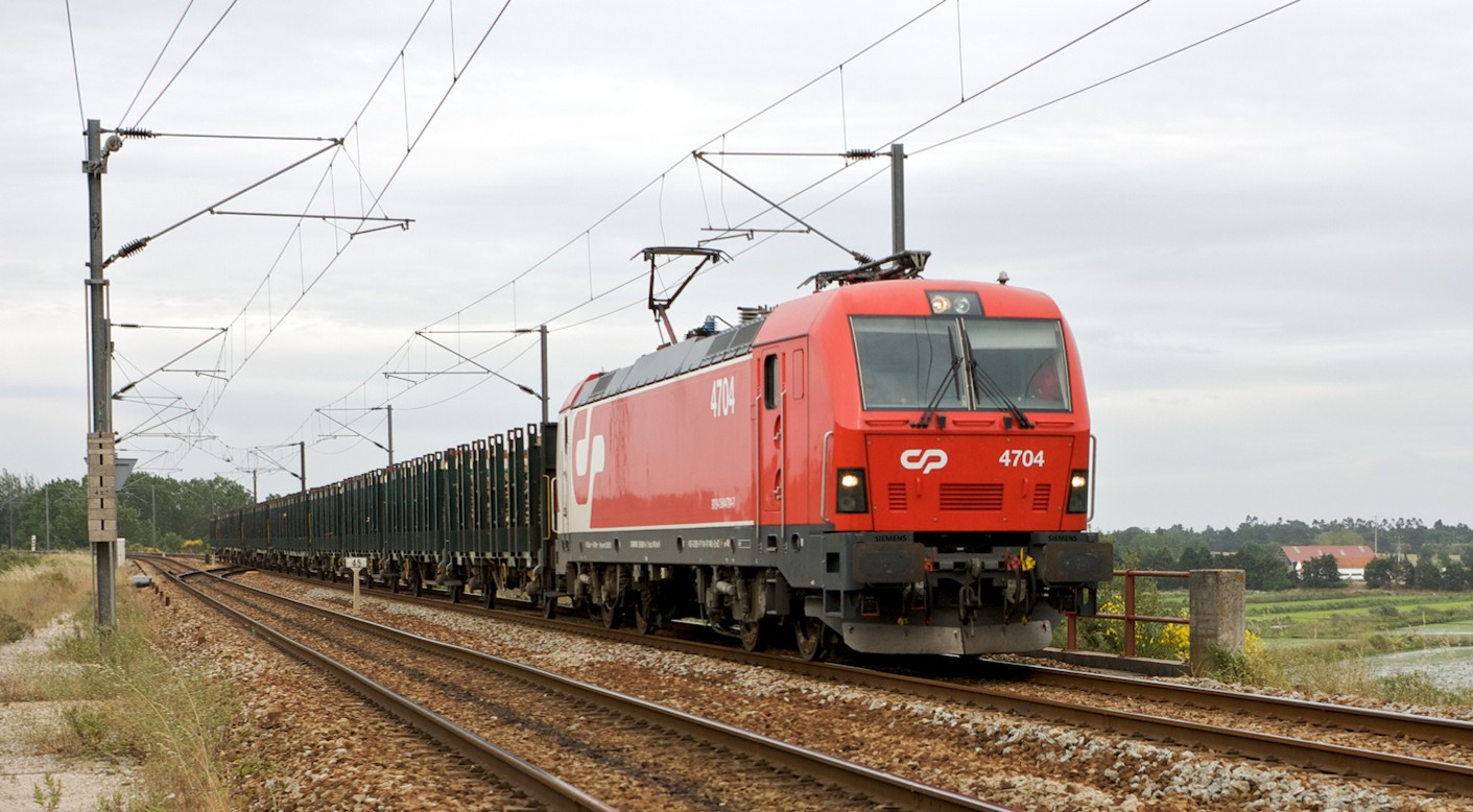 Tipo: Comboio de Transporte de Madeira 61080 [Sabóia - Praias do Sado] Local: Estação de Águas de Moura [Linha do Sul, PK 44] Data e hora: 2 de Junho de 2010 [16h49] Material: Locomotiva 4704 + 12 vagões CP Kbs